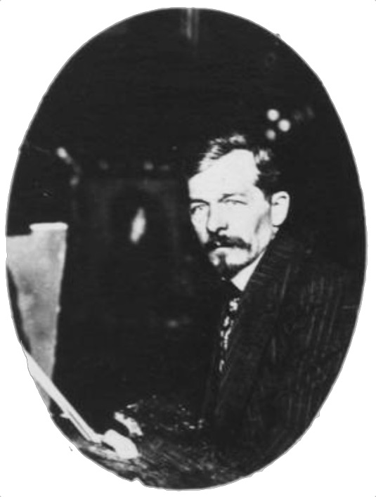 Photo du peintre Adolphe Déchenaud.